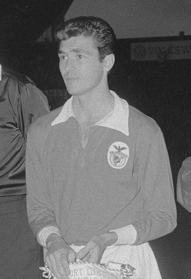 José Águas tijdens de finale van de Europacup I tegen Real Madrid